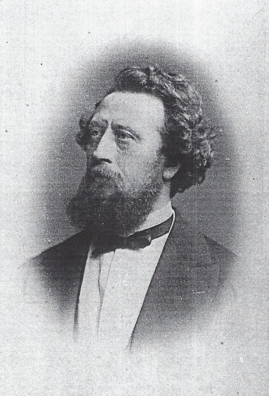 Porträtfotografie von Carl Julius Dannenberg (1813-1875)